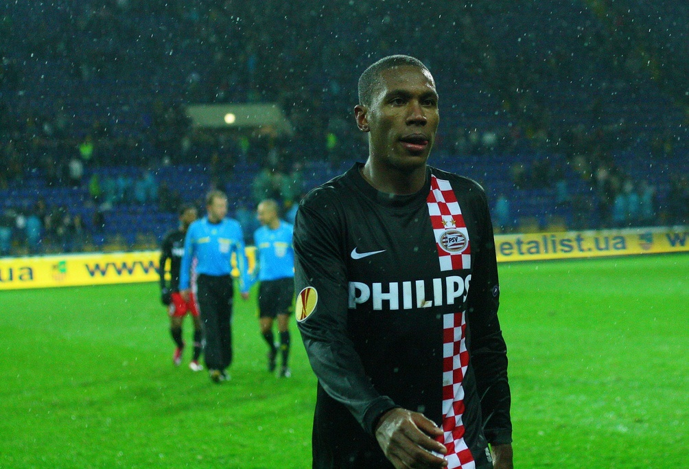 Марсело Marcelo